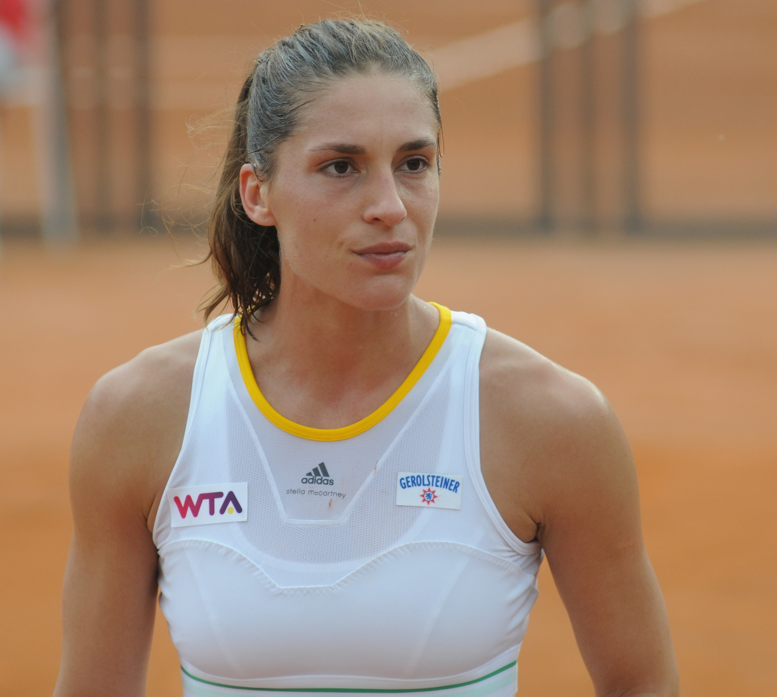 Andrea Petkovic at the 2014 Internazionali BNL d'Italia